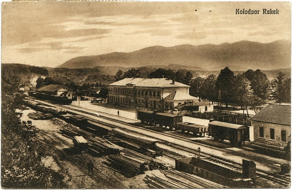 Razglednica Rakeka.